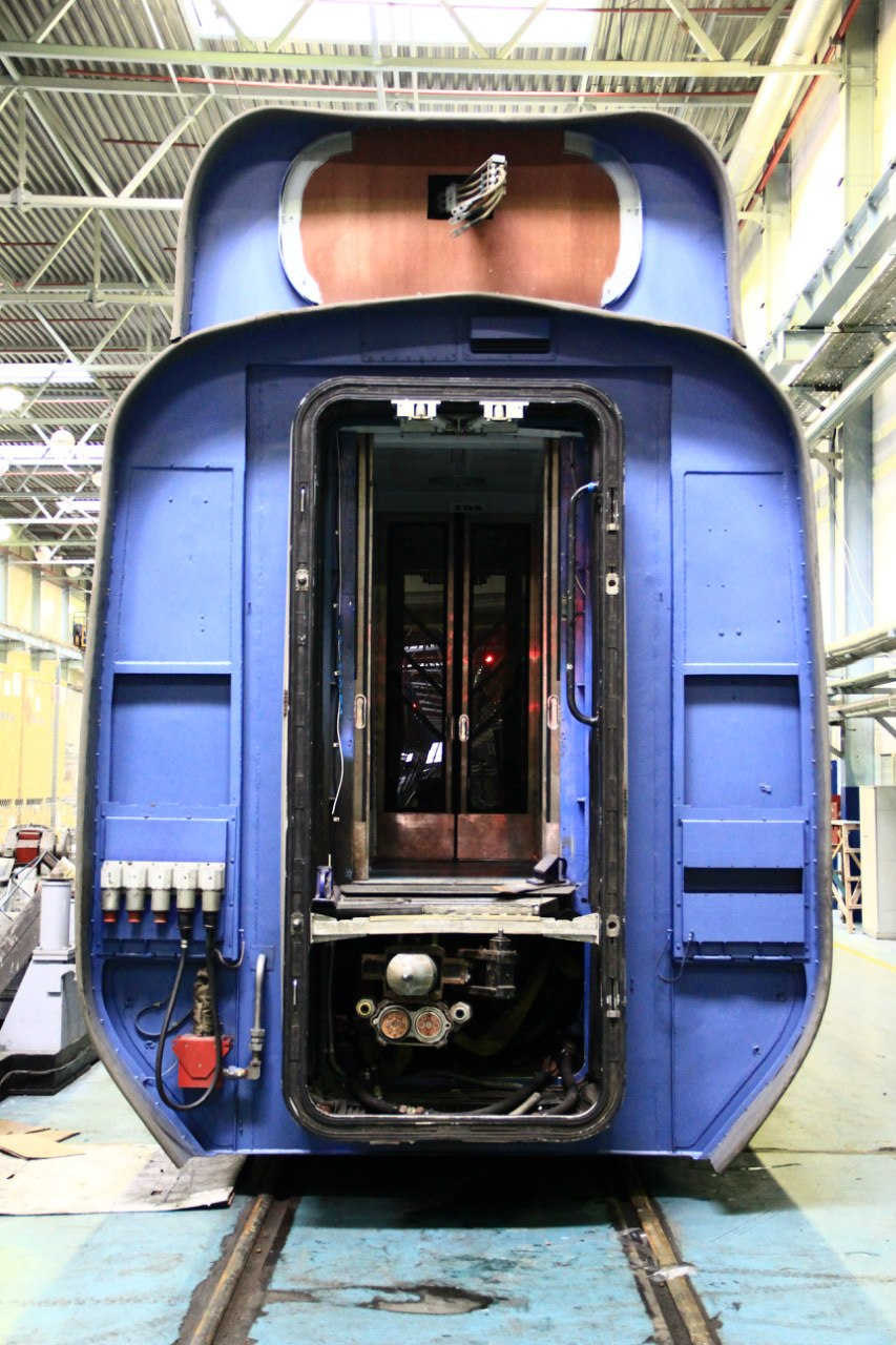 ЭС250 "Сокол"(при расцепке).